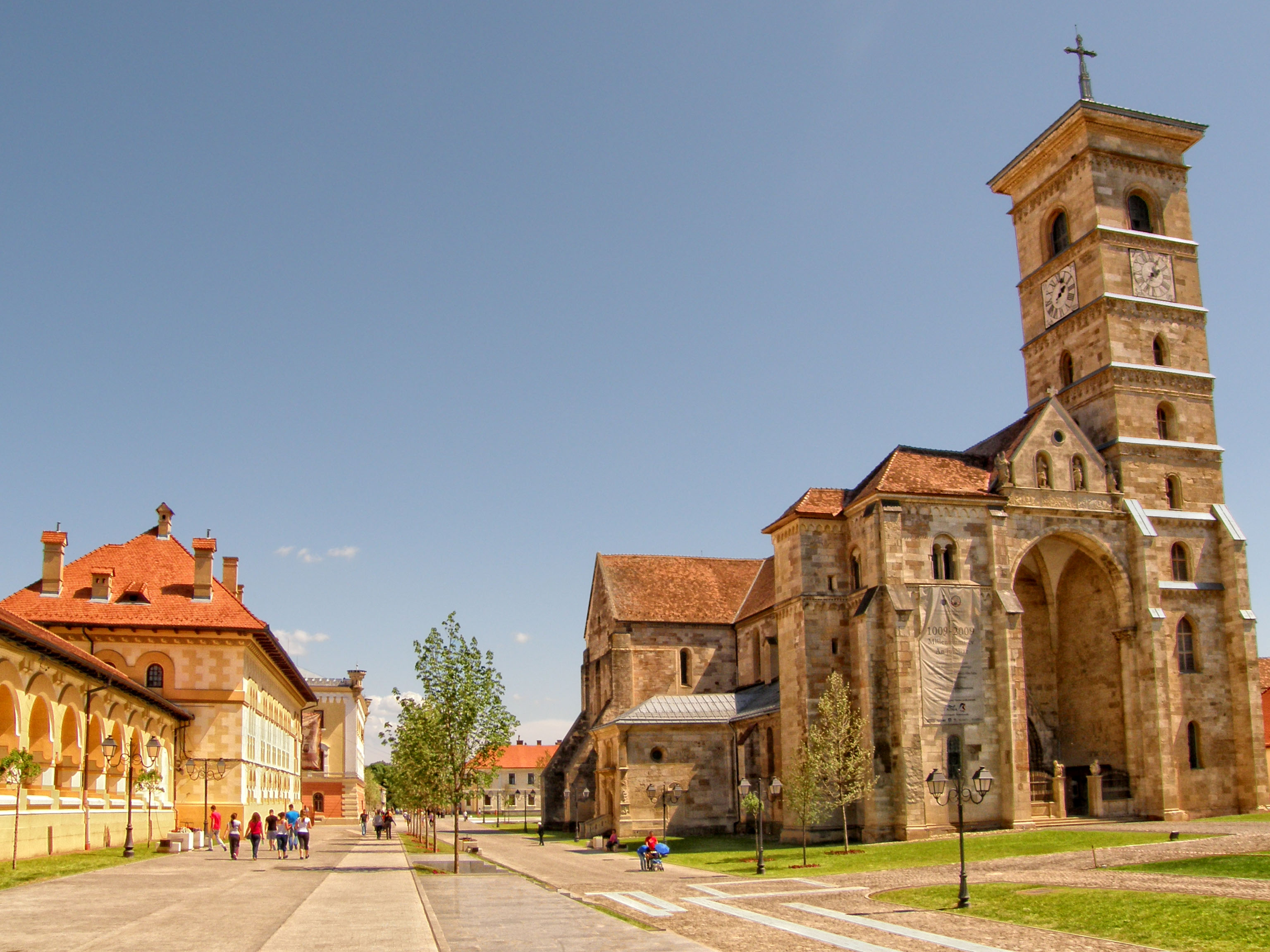 Cetatea Alba Iulia